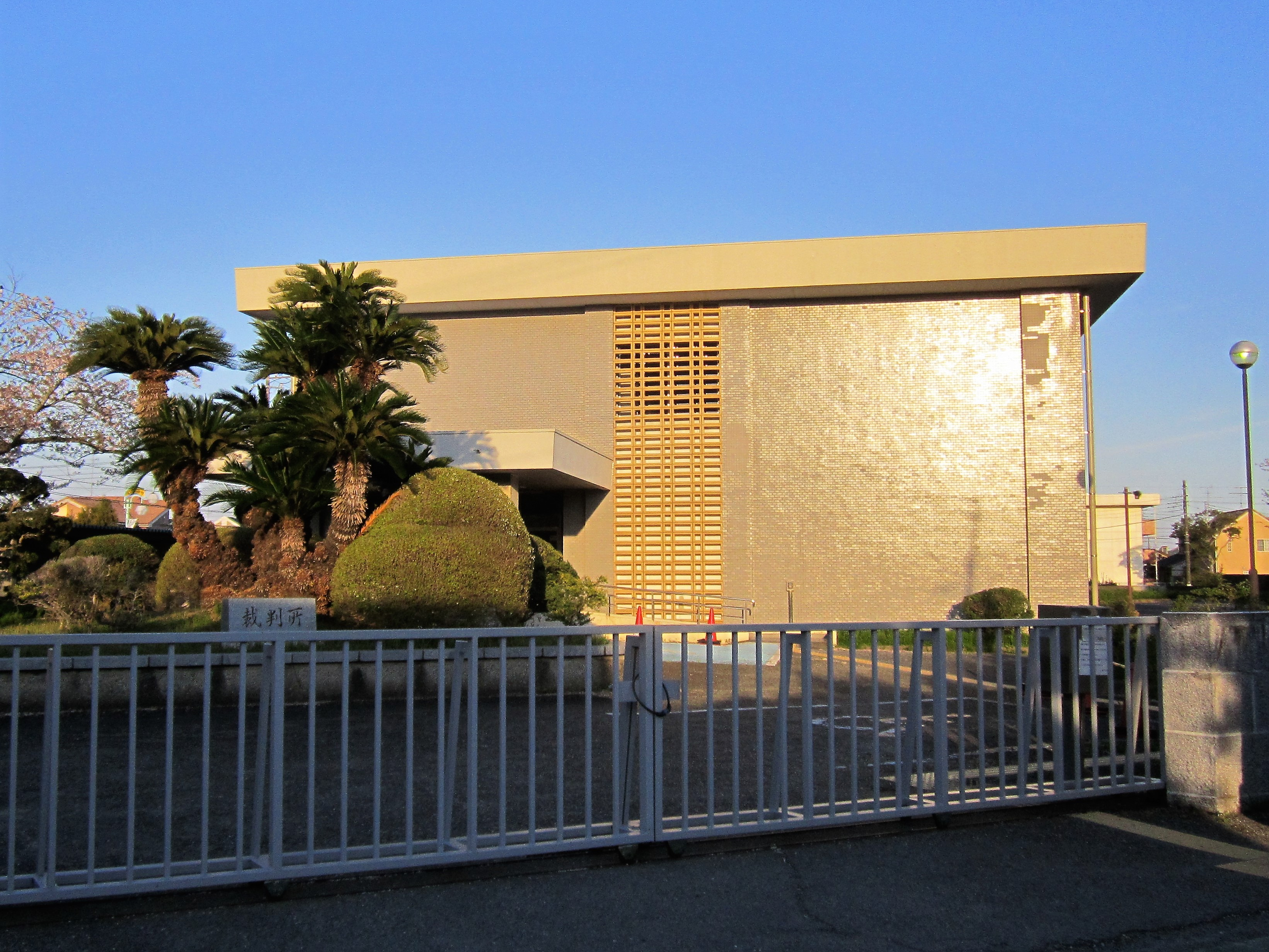 千葉一宮簡易裁判所・千葉地方裁判所一宮支部・千葉家庭裁判所一宮支部（一宮町一宮） Canon PowerShot A2200